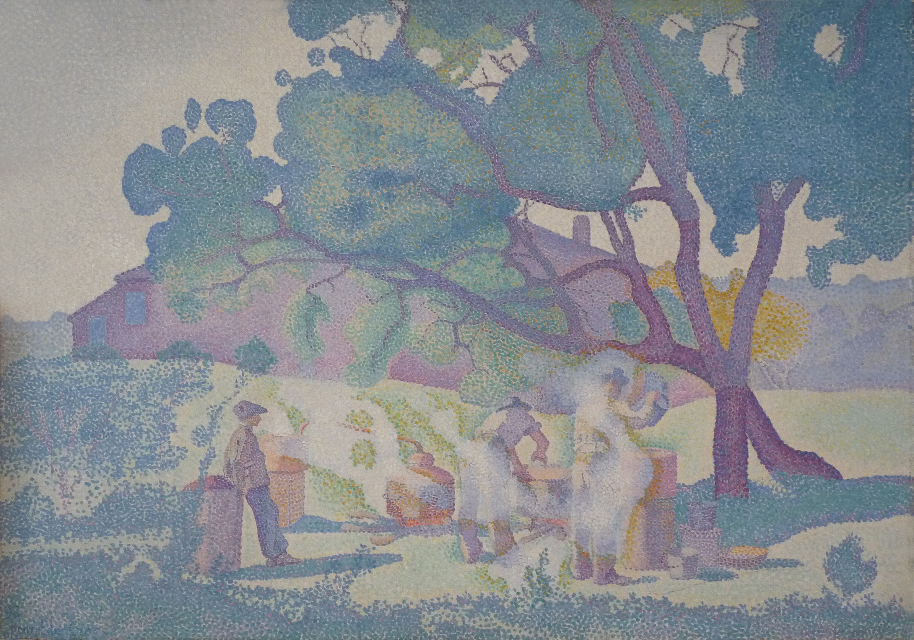 La Ferme, matin, huile sur toile, Musée des beaux-arts de Nancy